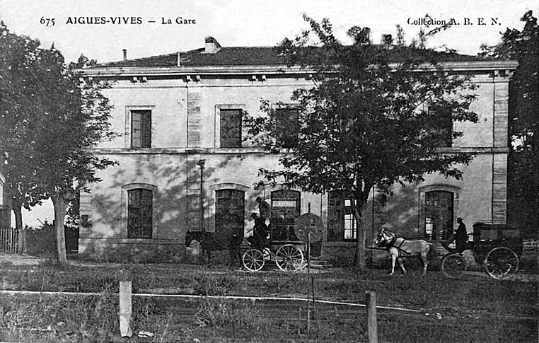 Le bâtiment voyageurs et l'entrée de la gare vers 1900.